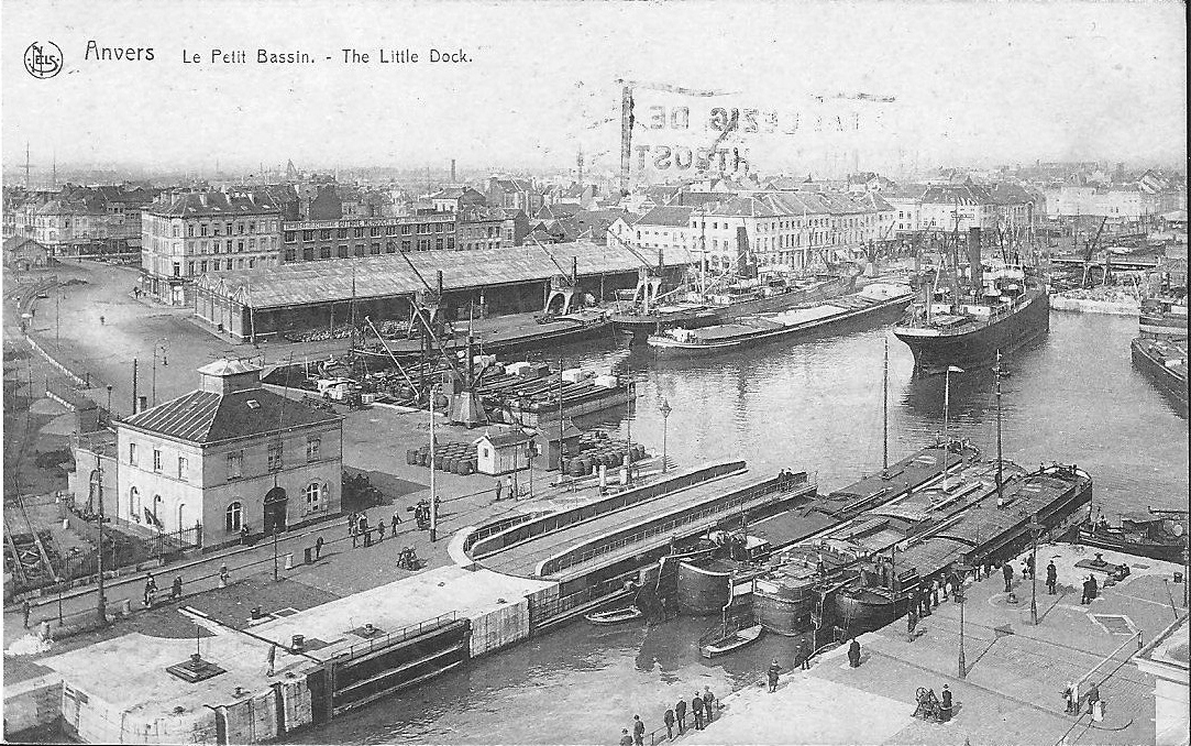 Briefkaart van de Bonapartedok verstuurd op 27-4-1922